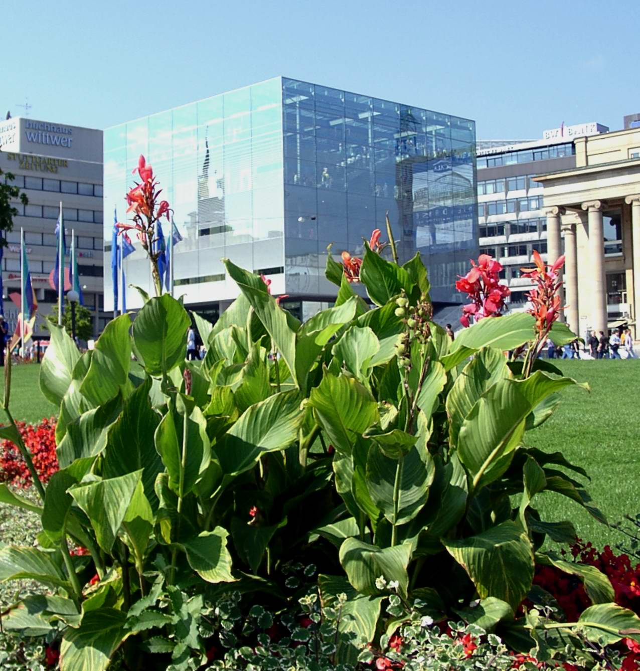 Kunstmuseum Stuttgart